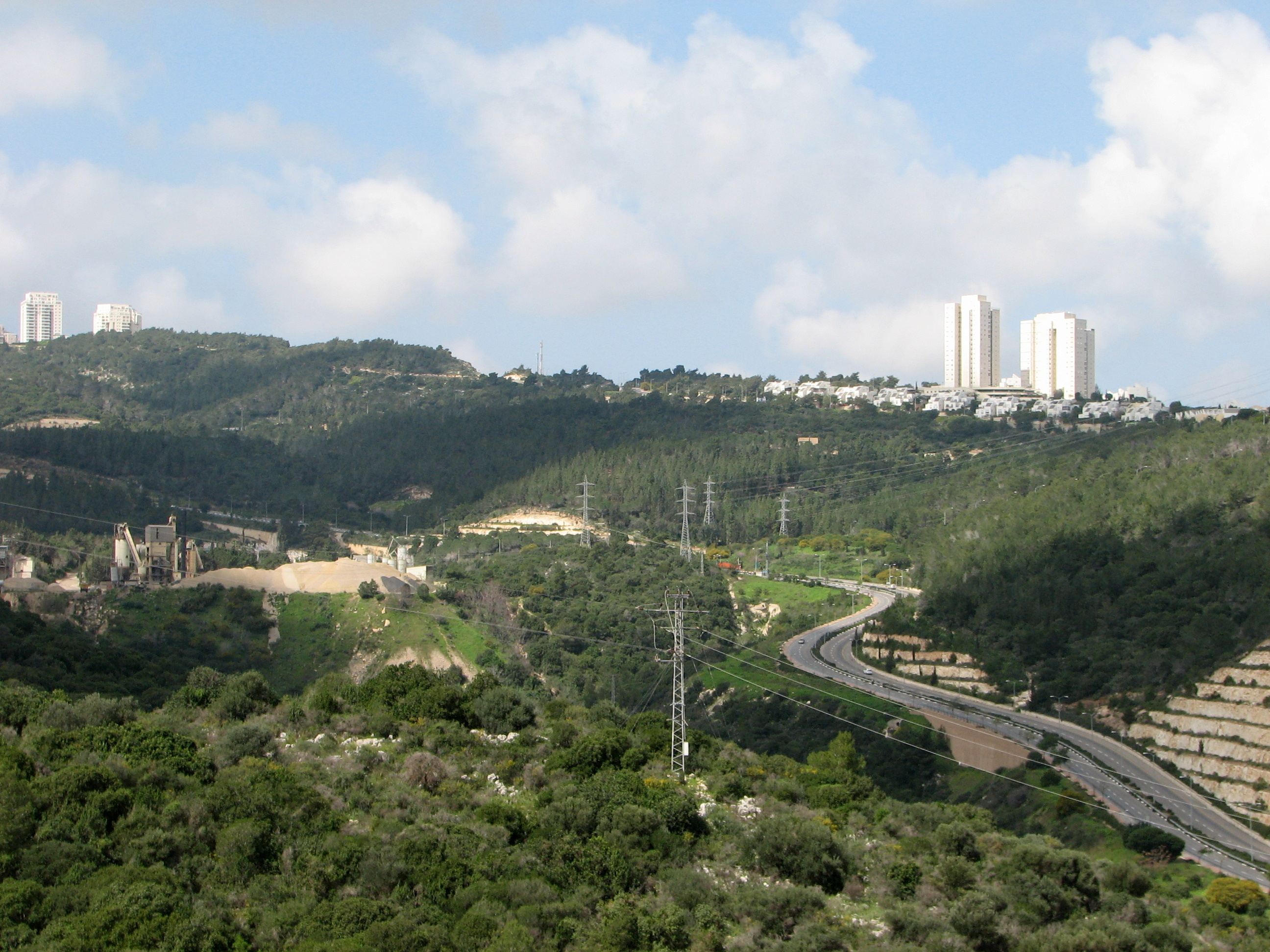 Nesher Nesher The City Nesher on Mount Carmel and Suburb:Givat Nesher תמונות משכונותיה של העיר נשר, גבעת נשר, כביש 705 ונחל נשר